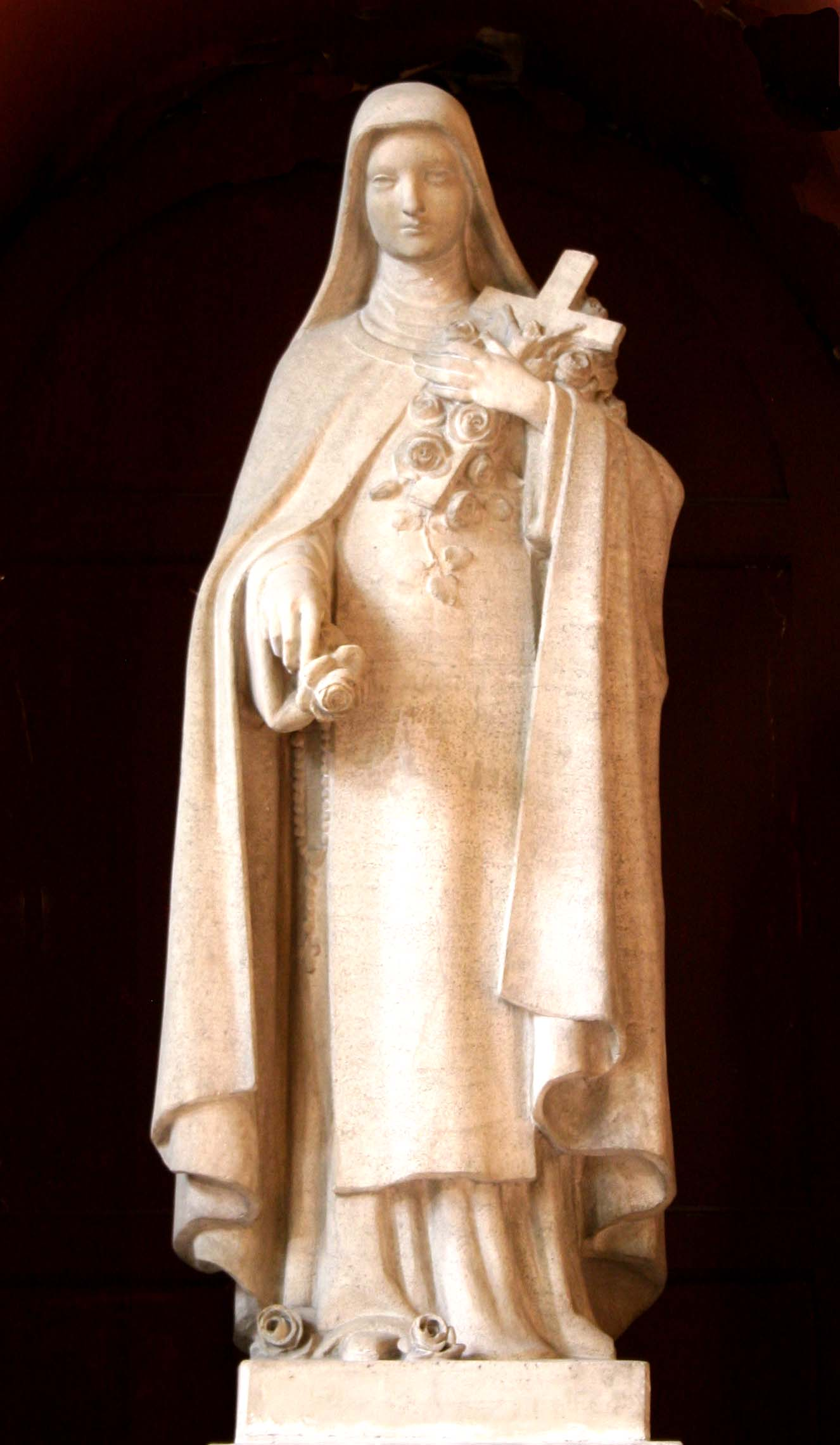 Statue de sainte Thérèse de Lisieux sculptée par François Carli et se trouvant dans l'église Saint-Cannat à Marseille.